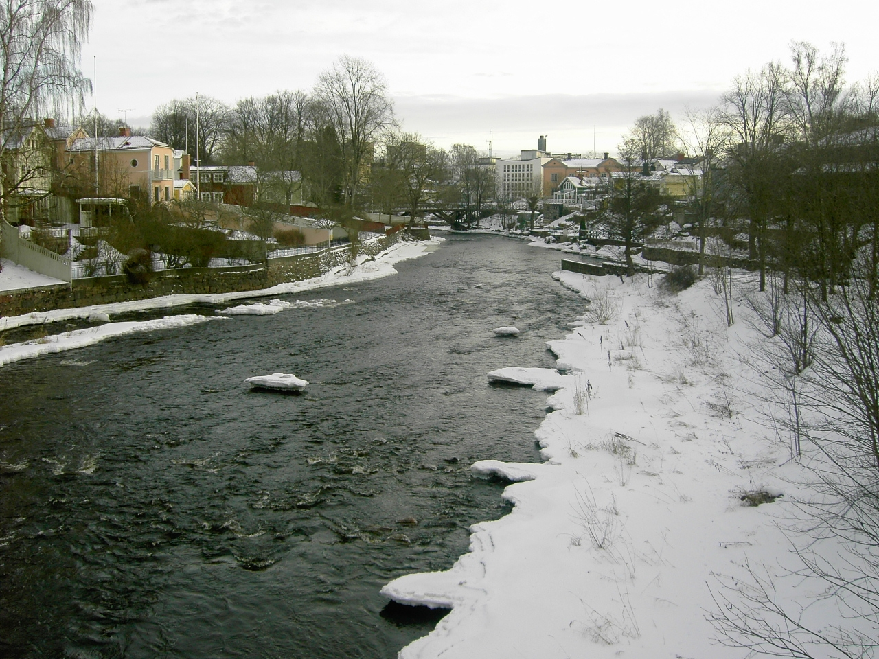 Gavleån mellan Drottningbron och Gammelbron i Gävle.